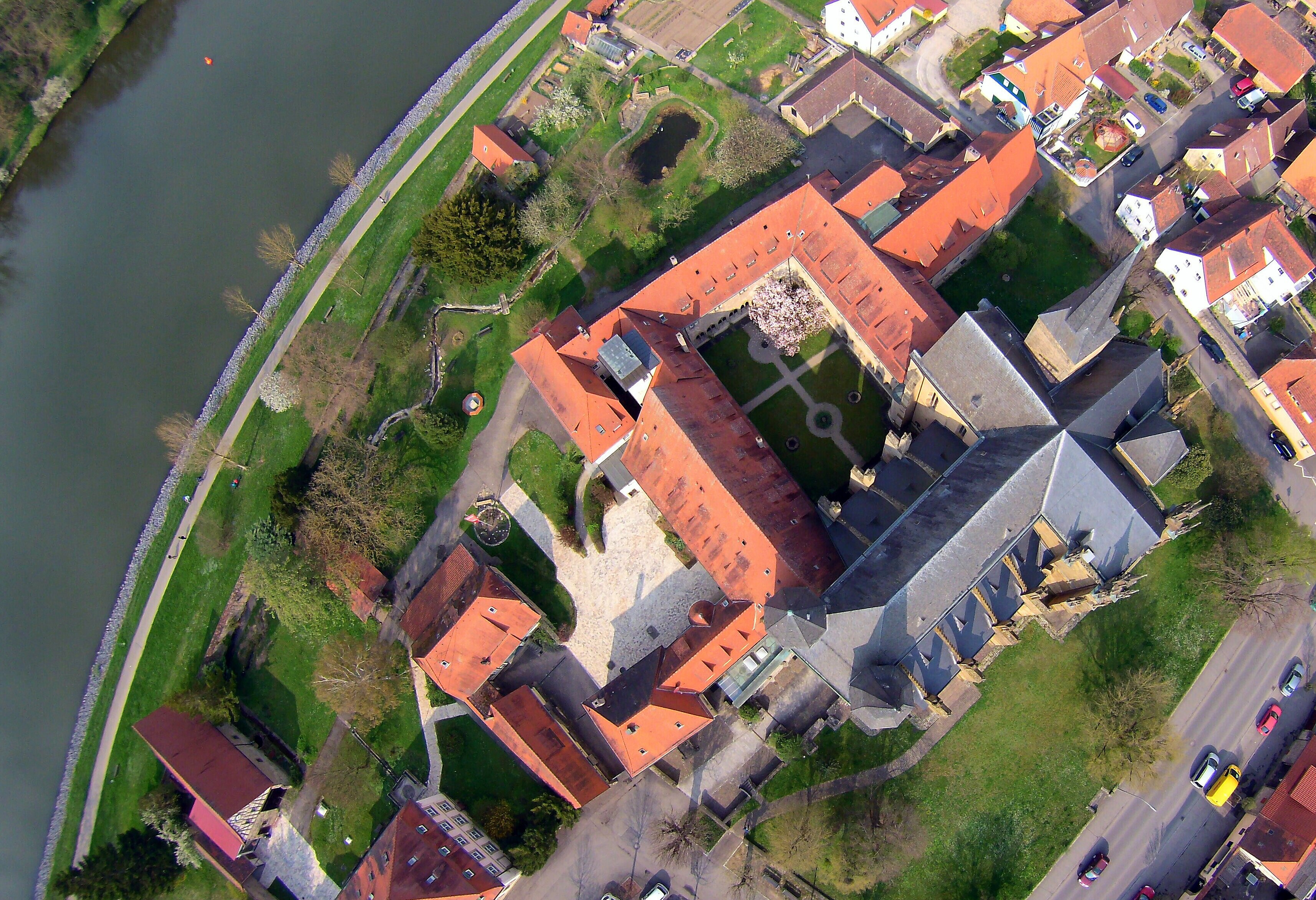 Stiftskirche St. Peter Bad Wimpfen